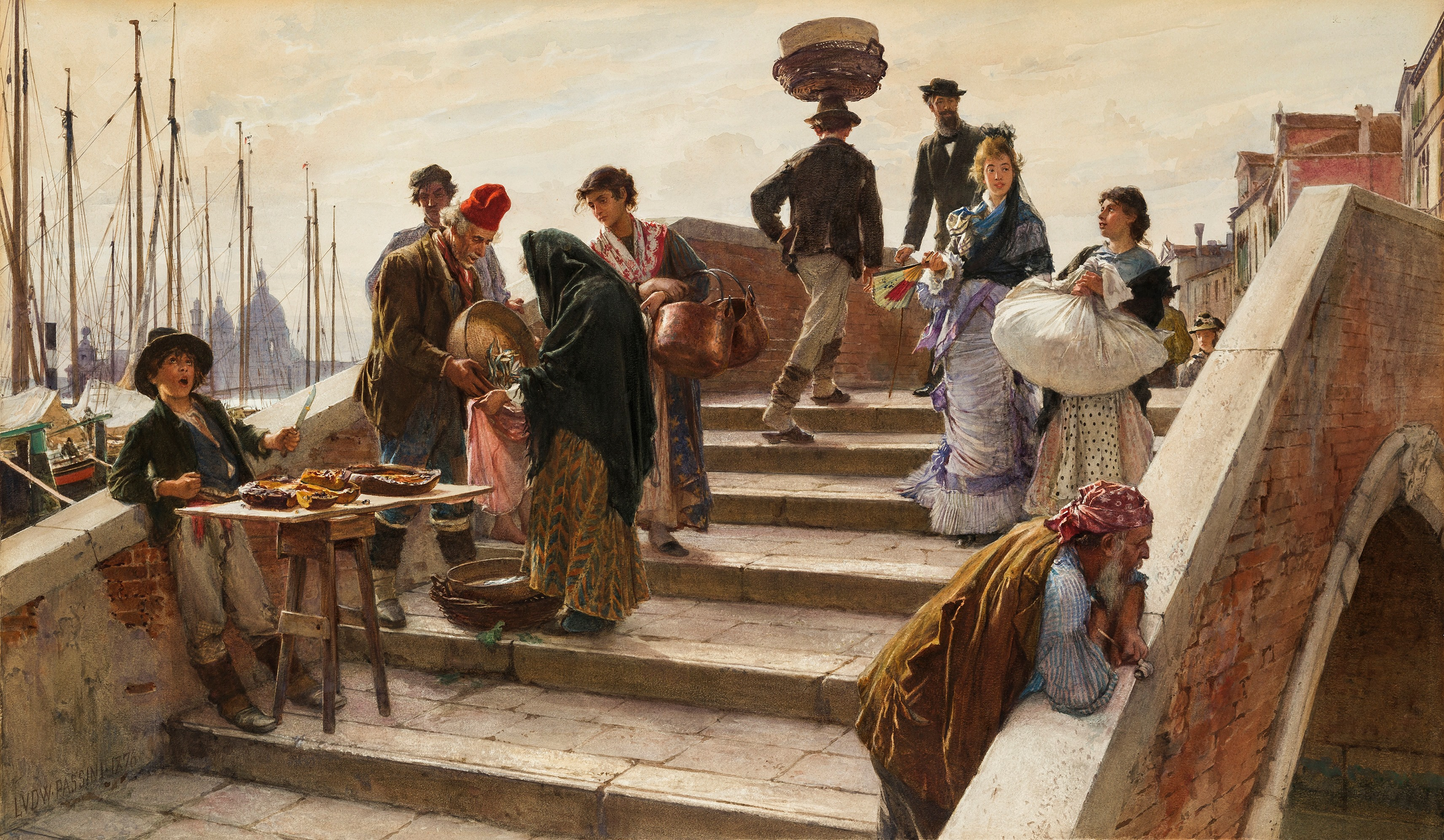 Ludwig Passini: Eine Brücke in Venedig. Aquarell auf Papier, 45 x 75 cm, links unten signiert und datiert